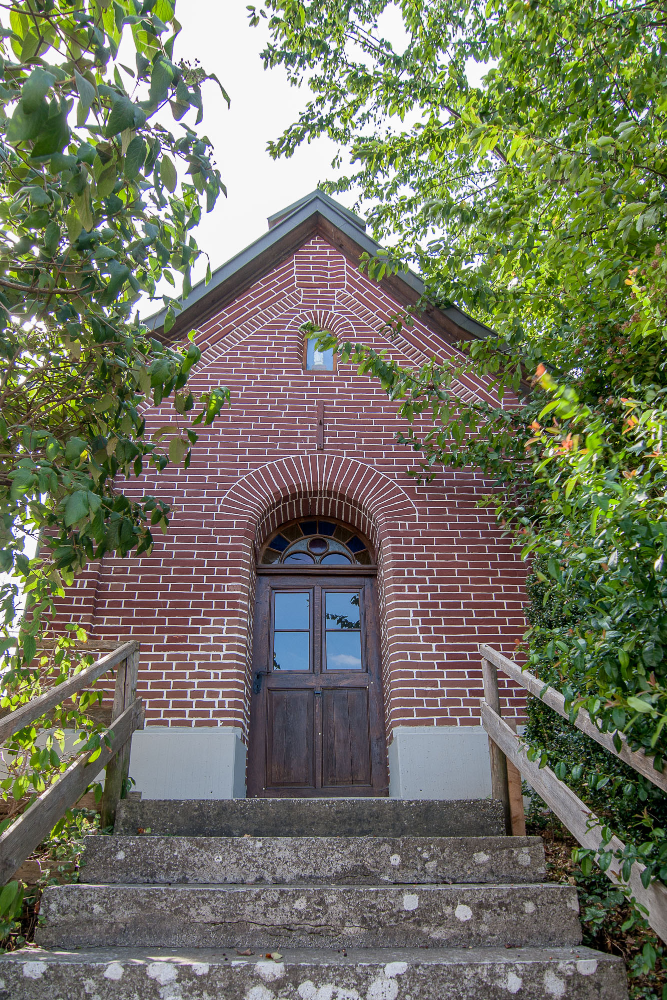 Backsteinkapelle; neugotisch; 1869; mit Ausstattung.This is a photograph of an architectural monument.